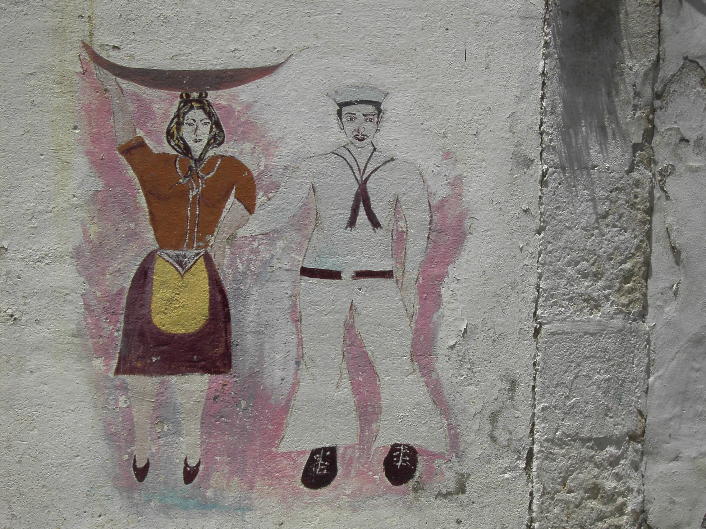 Lisboa, Alfama: murale della ragazza e il marinaio by Lalupa